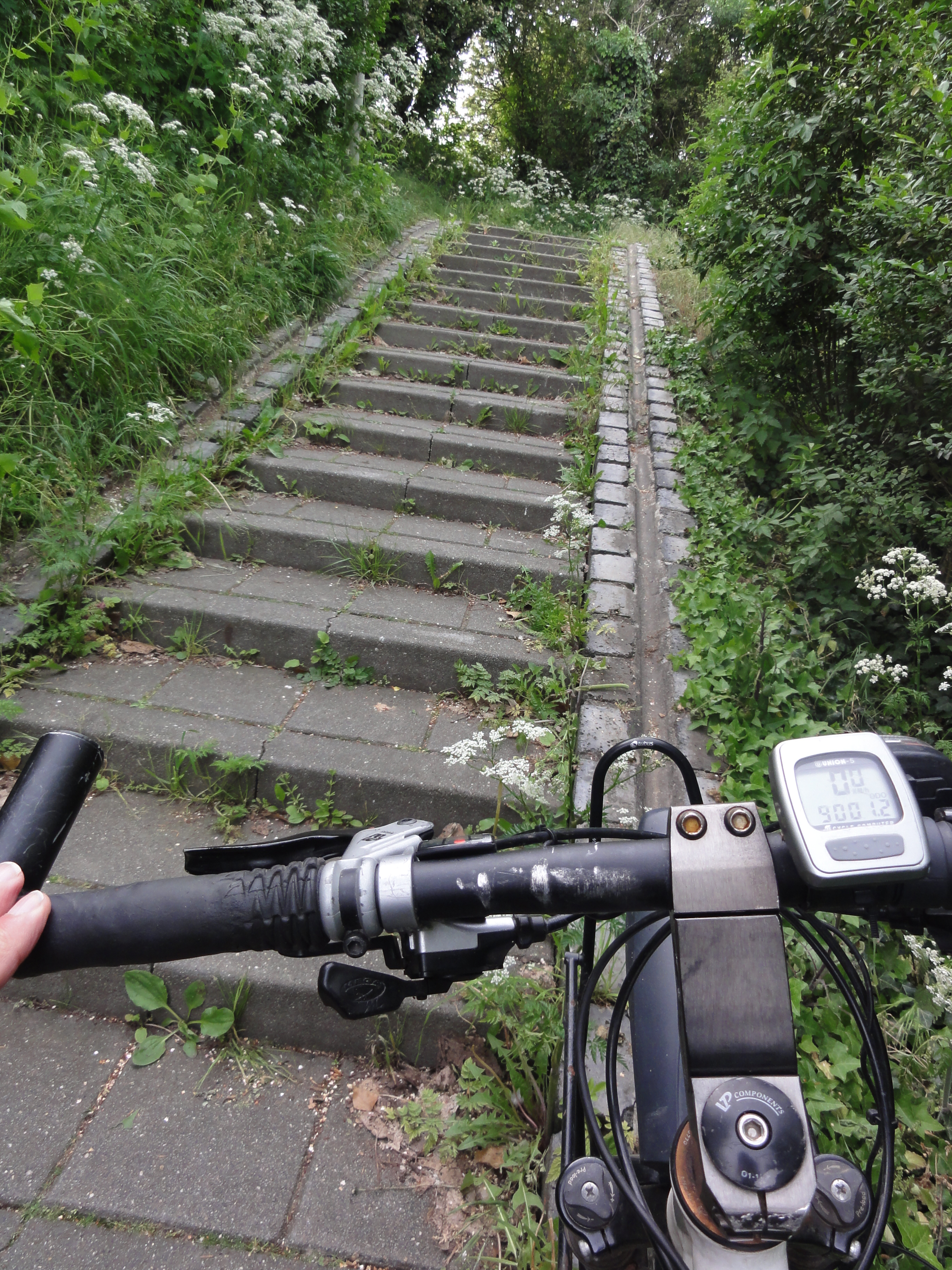 Lent (Nijmegen) stenen Waalbrugtrap met fietsgeul